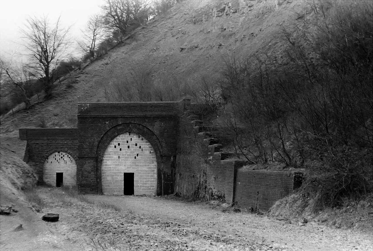 Clydach Gorge